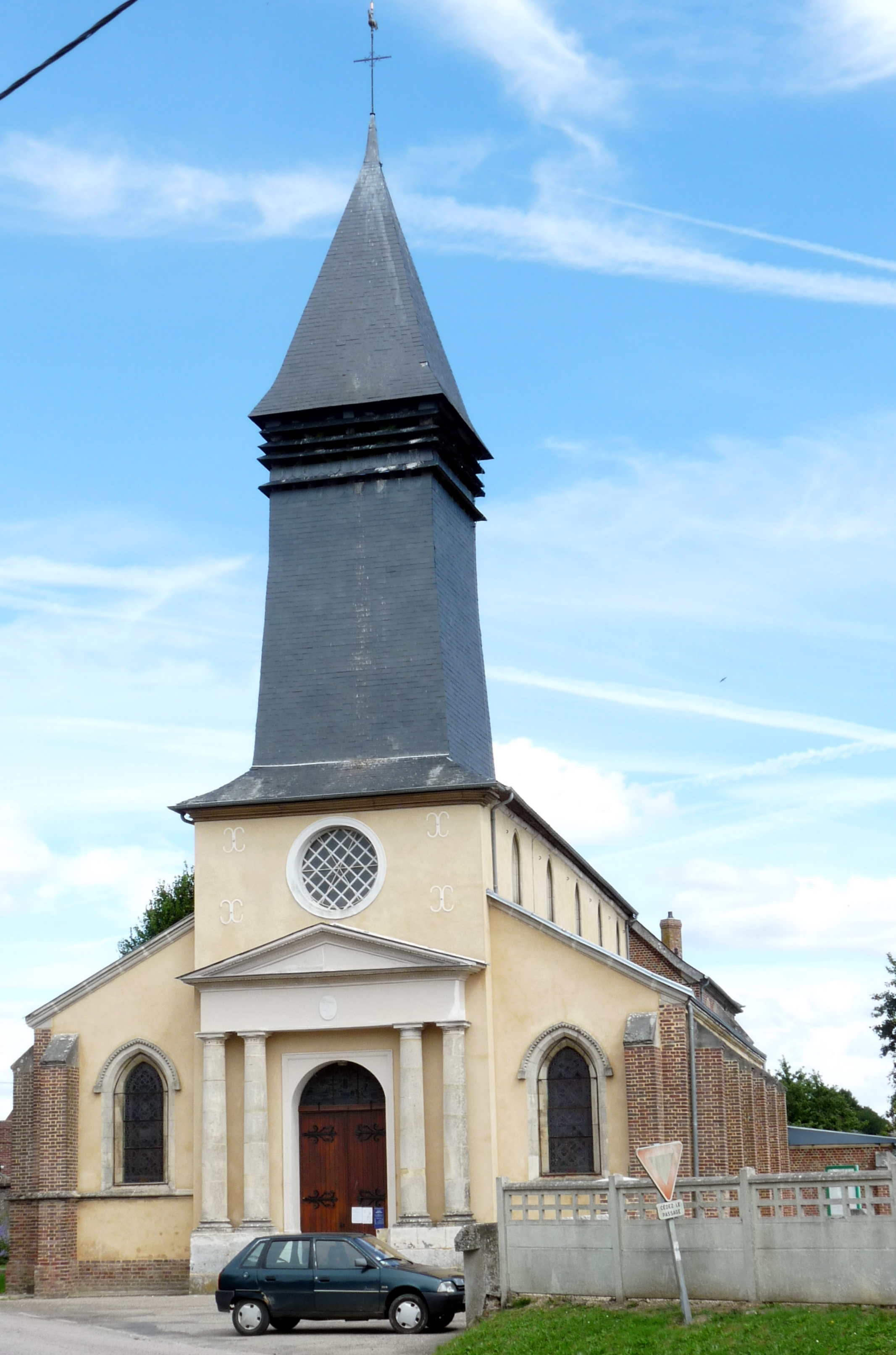 Église Notre-Dame de La Neuville-Chant-d'Oisel (Inscrit) .